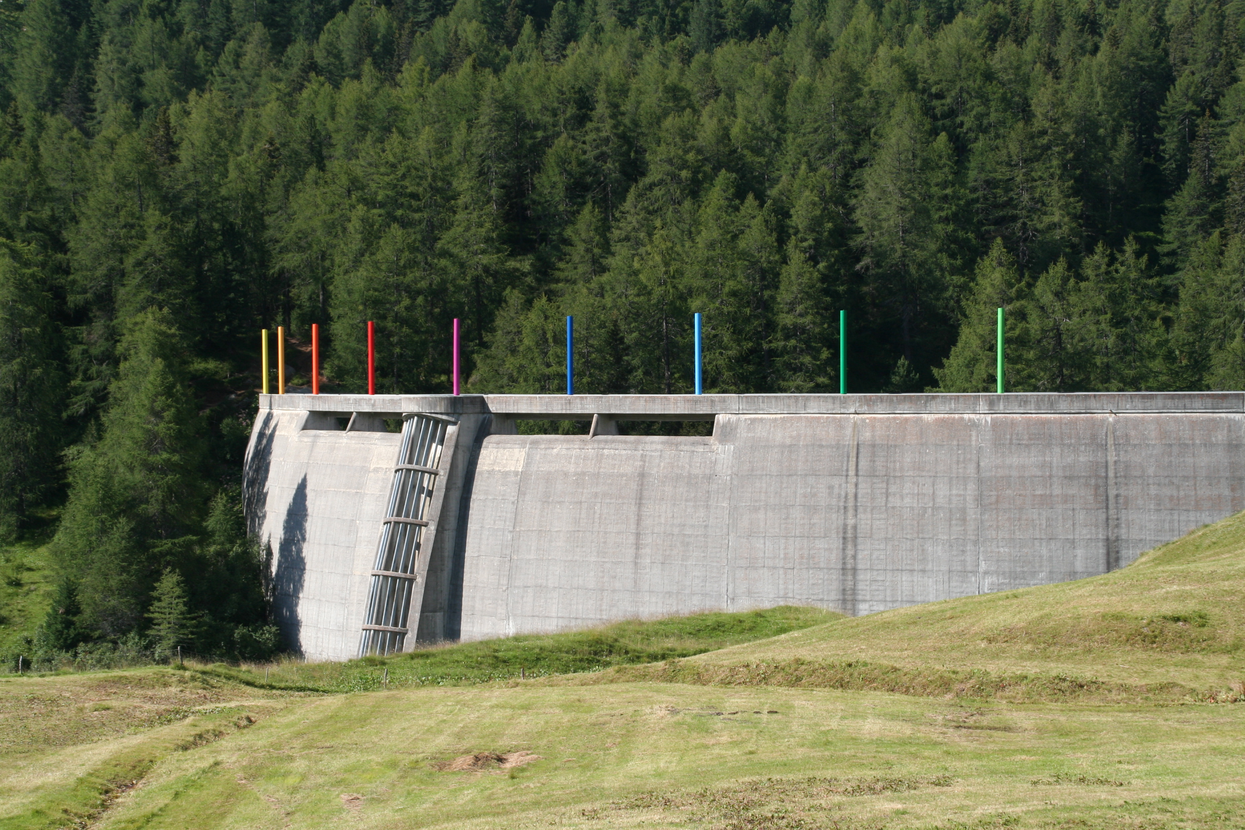 Culur